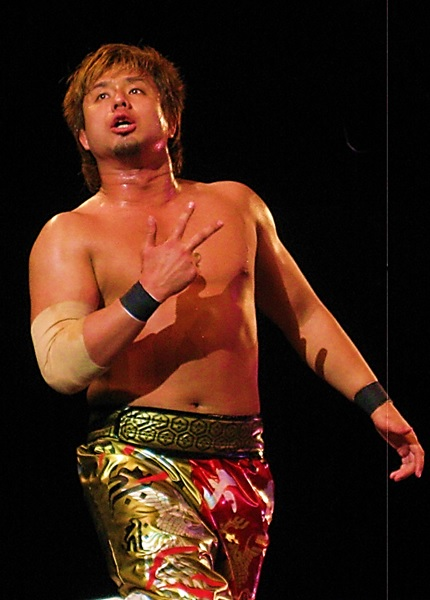 2015年3月22日 ベイコム総合体育館「Road to INVASION ATTACK 2015」YOSHI-HASHI